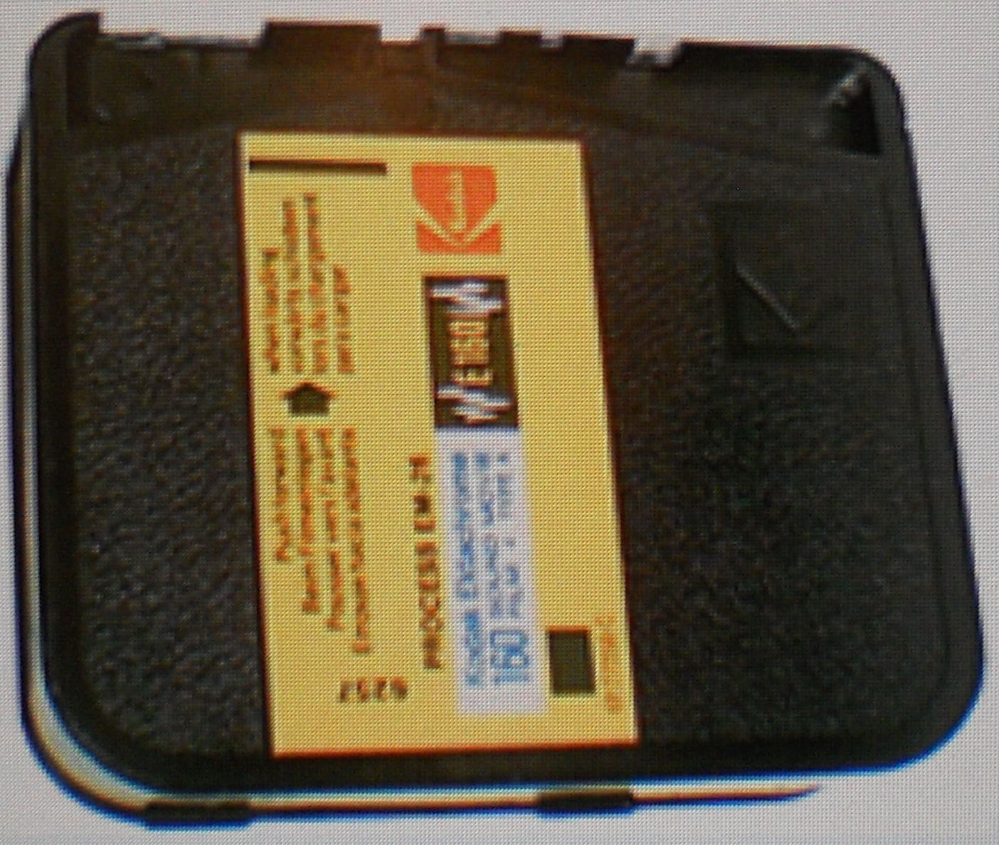 Ektachrom Film